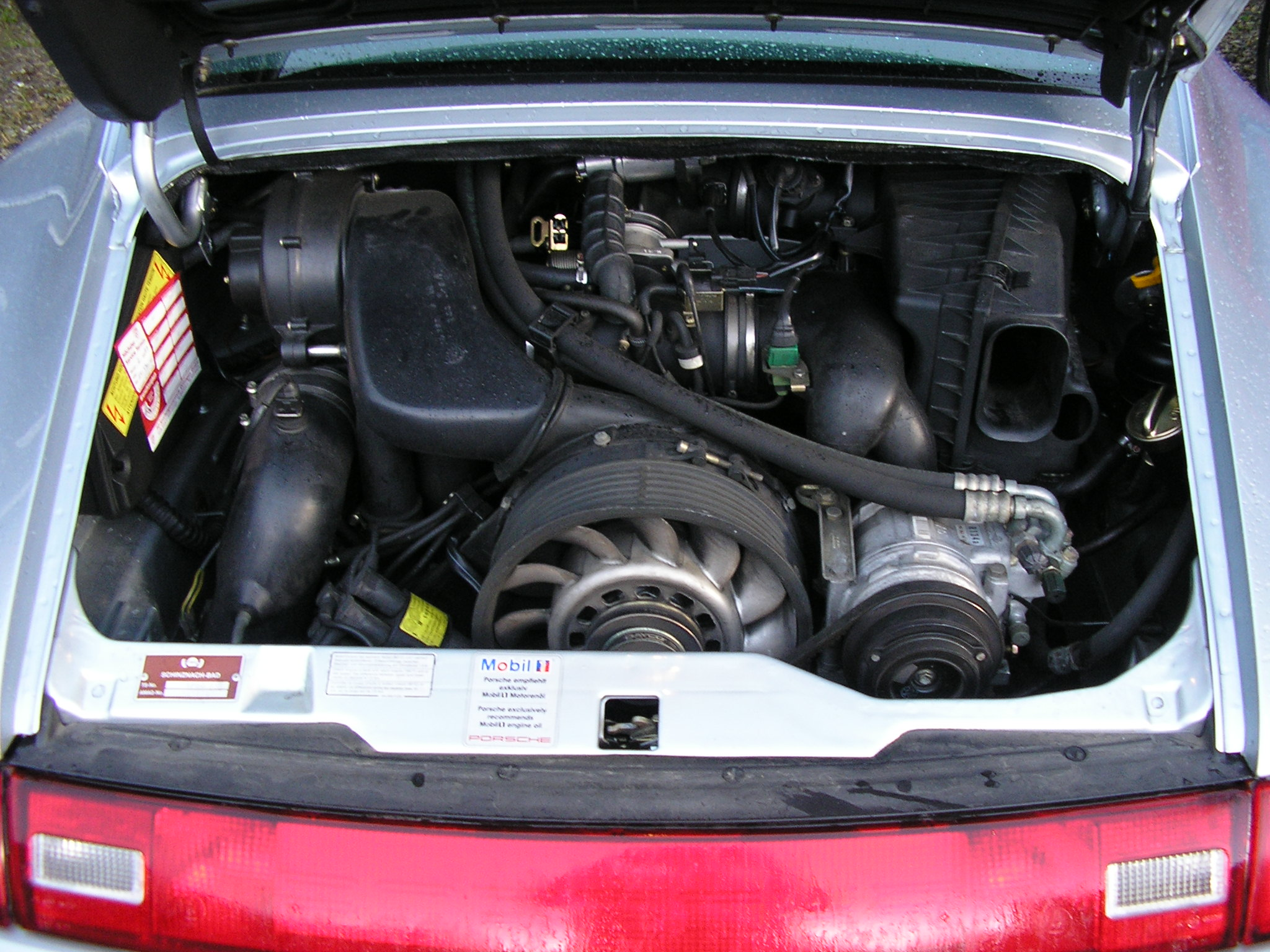 Motorraum Porsche 993 (911) 3,6 Liter 200kW